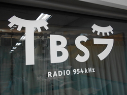 TBSラジオの旧ロゴ(2001年〜2006年)